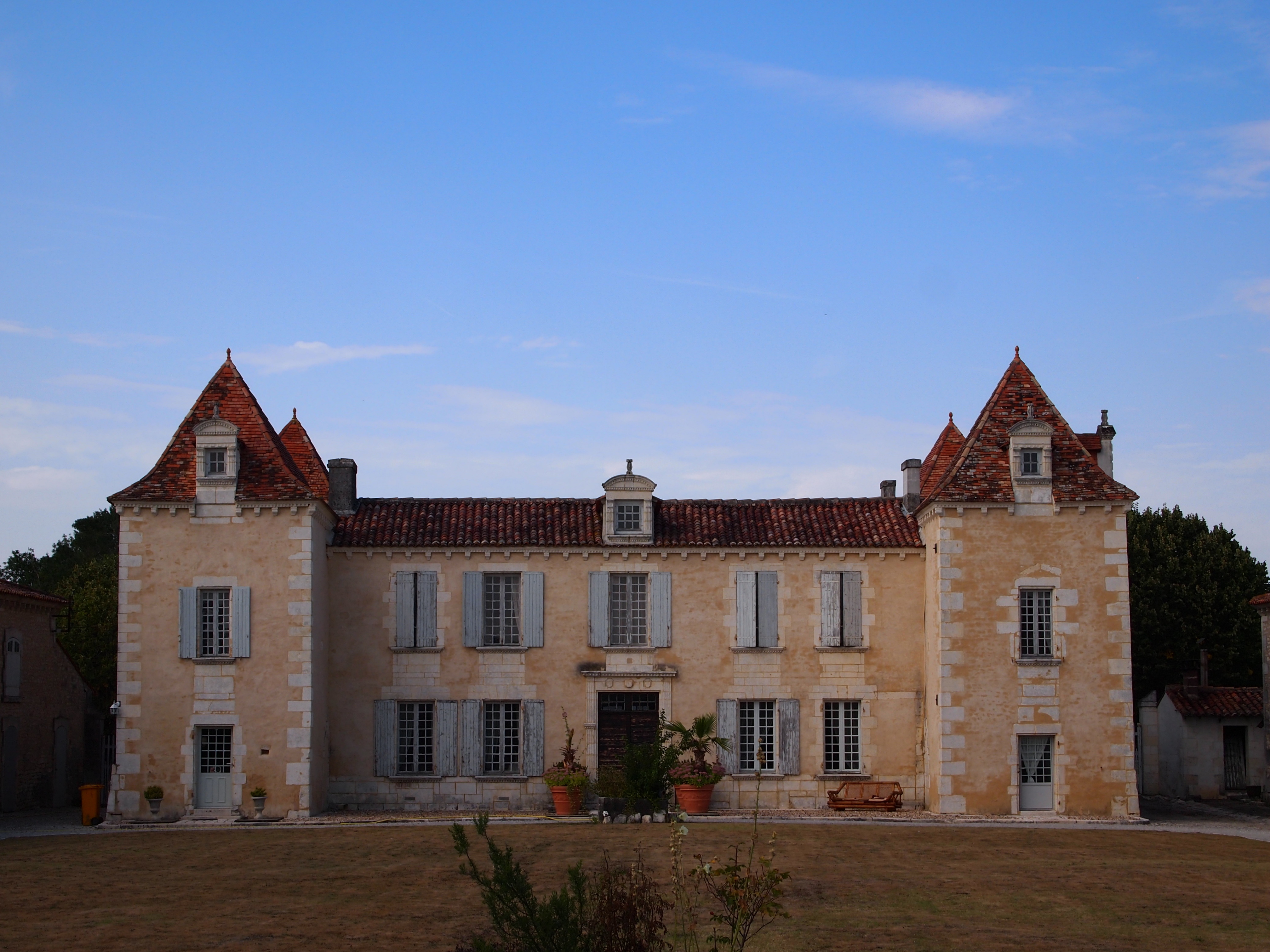 Logis de l'Eclopard à Gensac-la-Pallue, en Charente (France), le long du Chemin Boisné